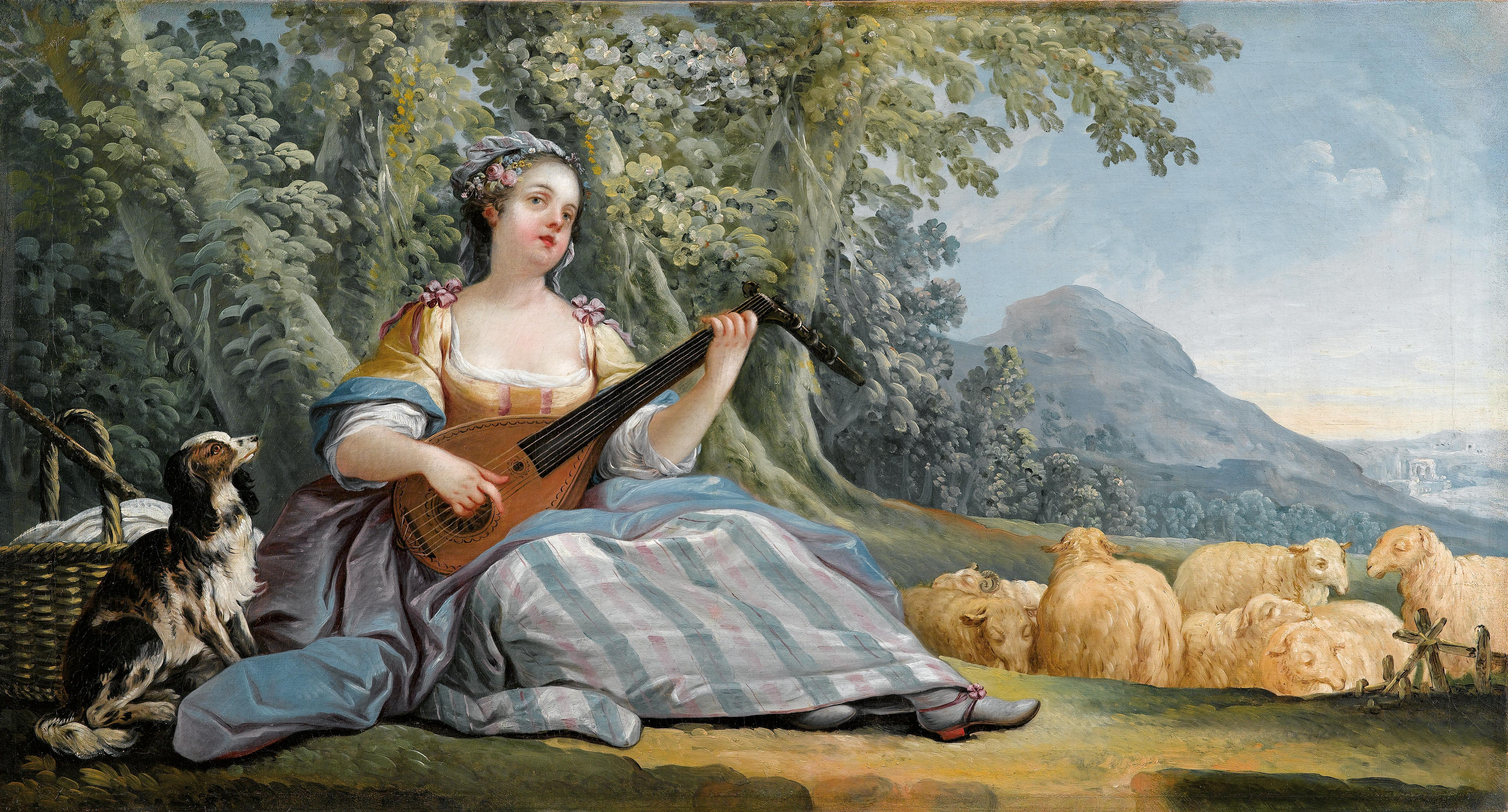 Ein Hirtenmädchen die Mandoline spielend, Öl auf Leinwand, 67 x 126 cm Provenienz: Auktion Christie’s, New York, 22. Mai 1998, Lot 143